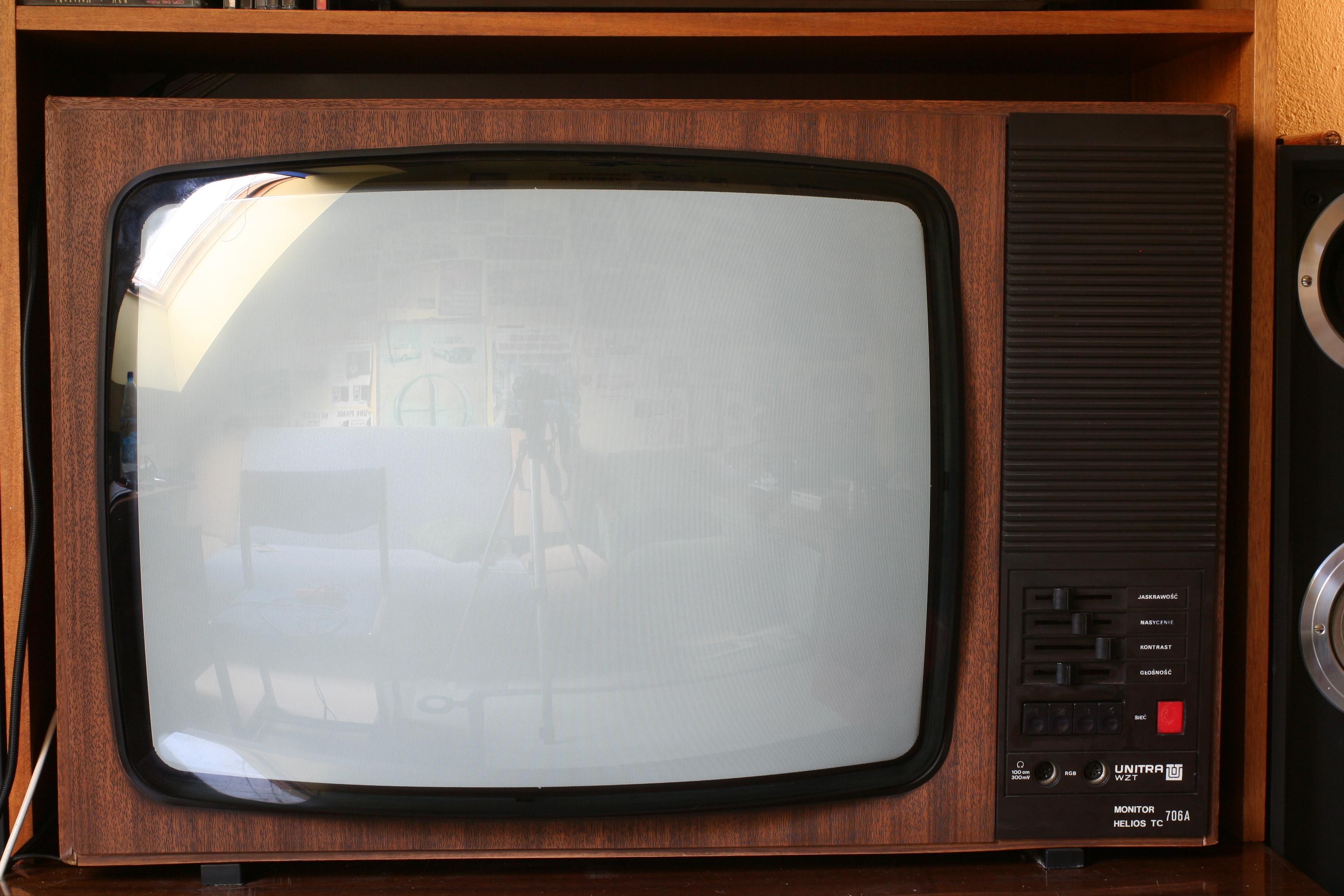 Unitra Helios TC 706 wersja monitorowa.